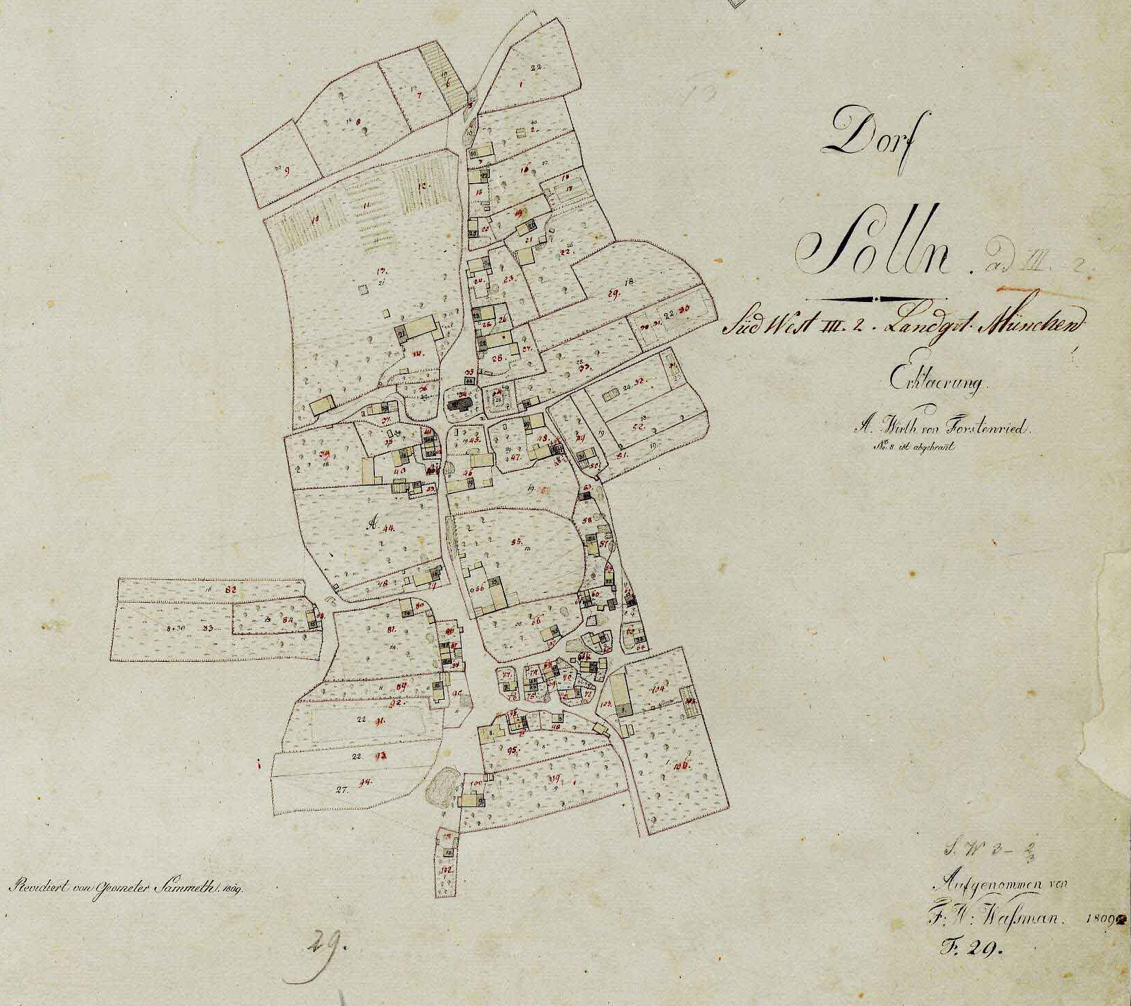 Historische Karten von Solln